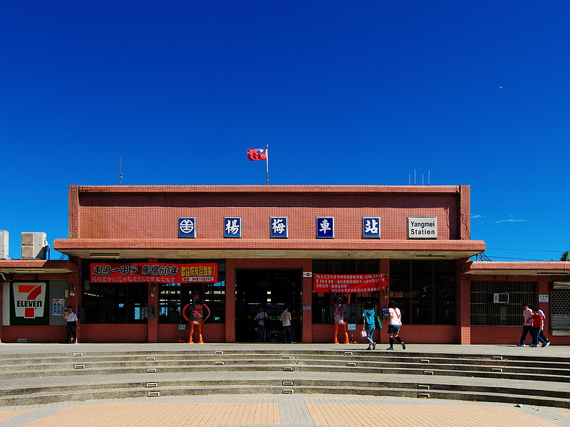 中文（台灣）: 楊梅舊火車站，目前已拆除重建。